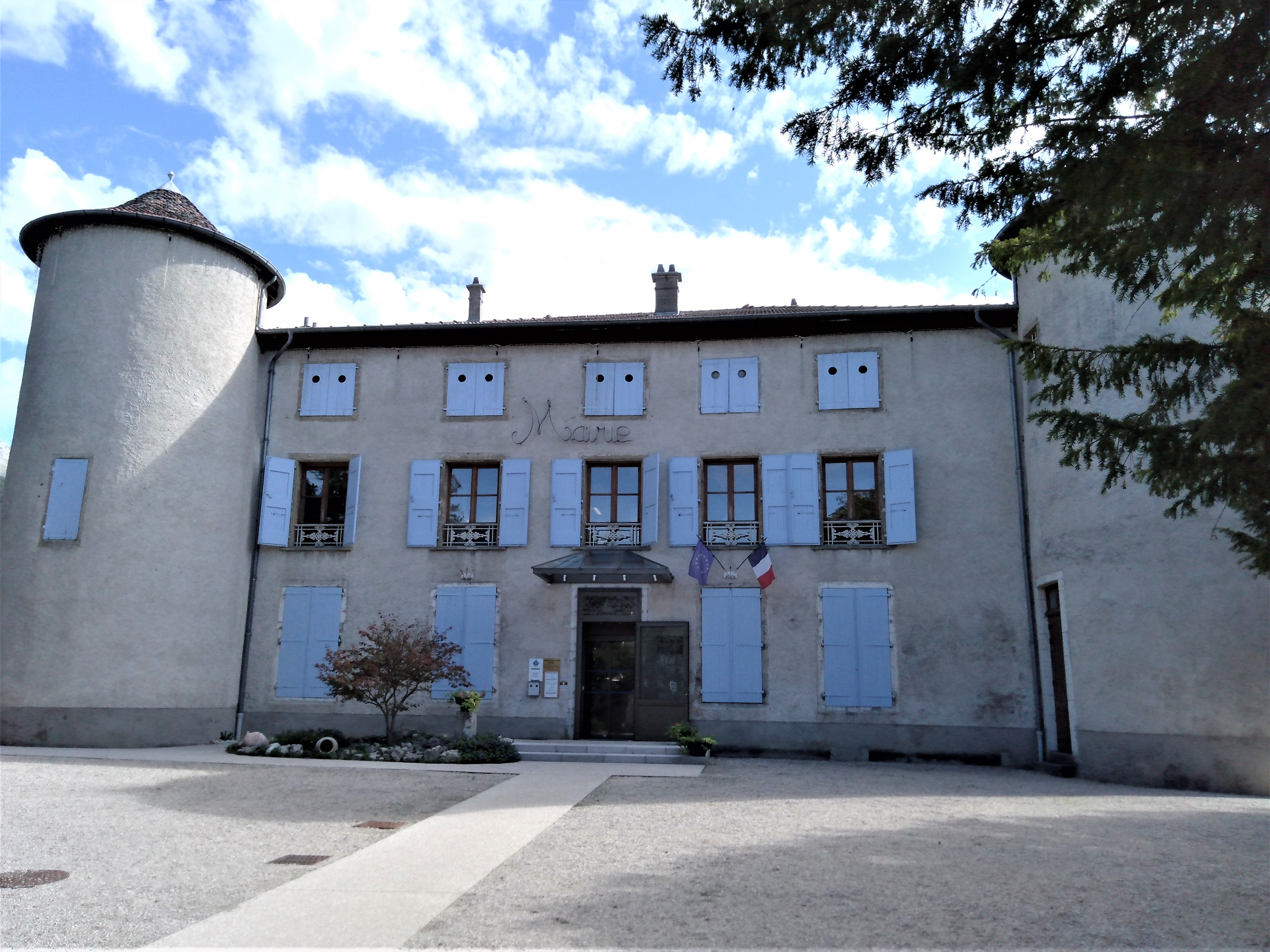 Mairie de Coublevie en 2019